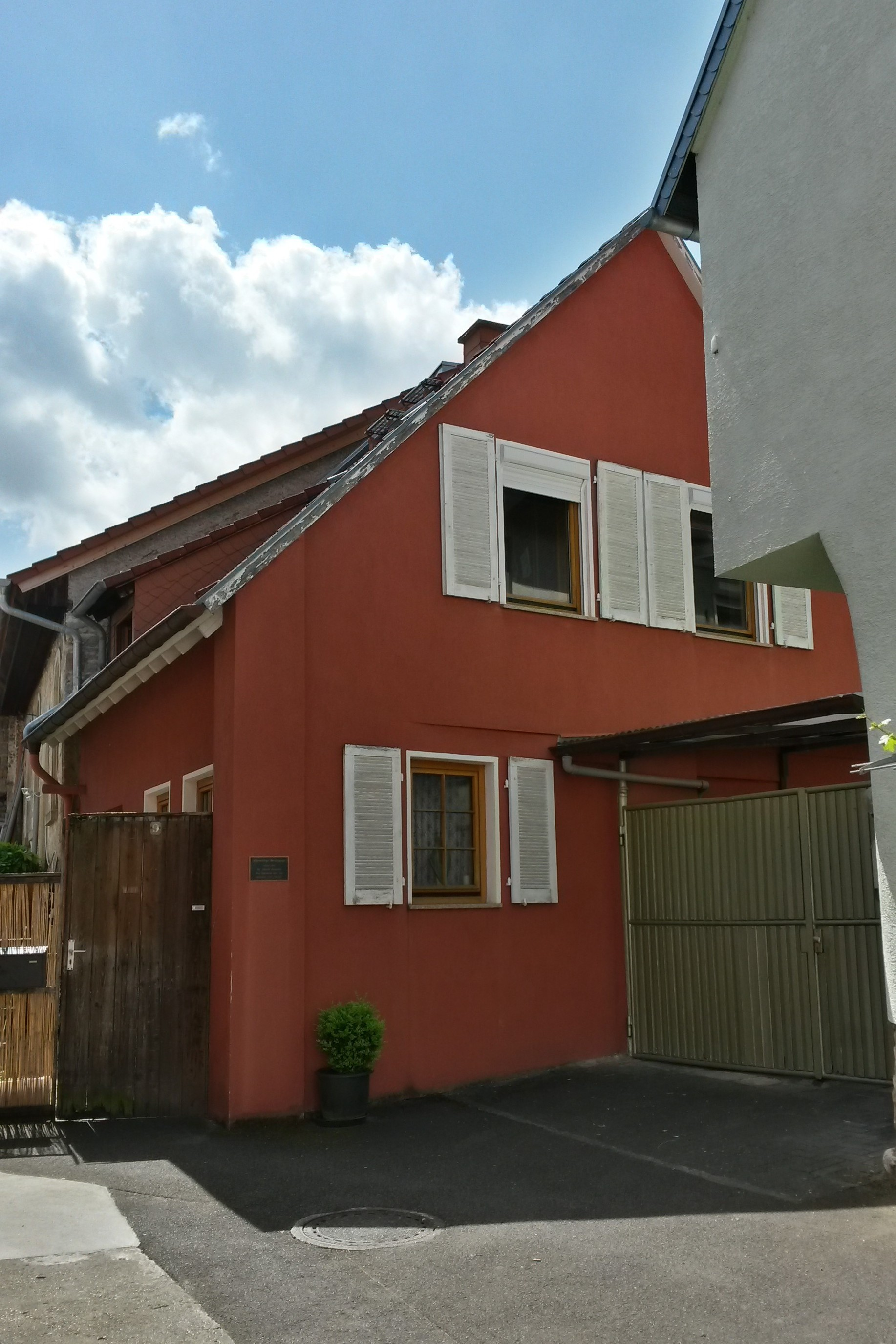 ehemalige Synagoge in Gau-Algesheim, Querbein 9, kleiner Bruchsteinbau im Rundbogenstil, 1861